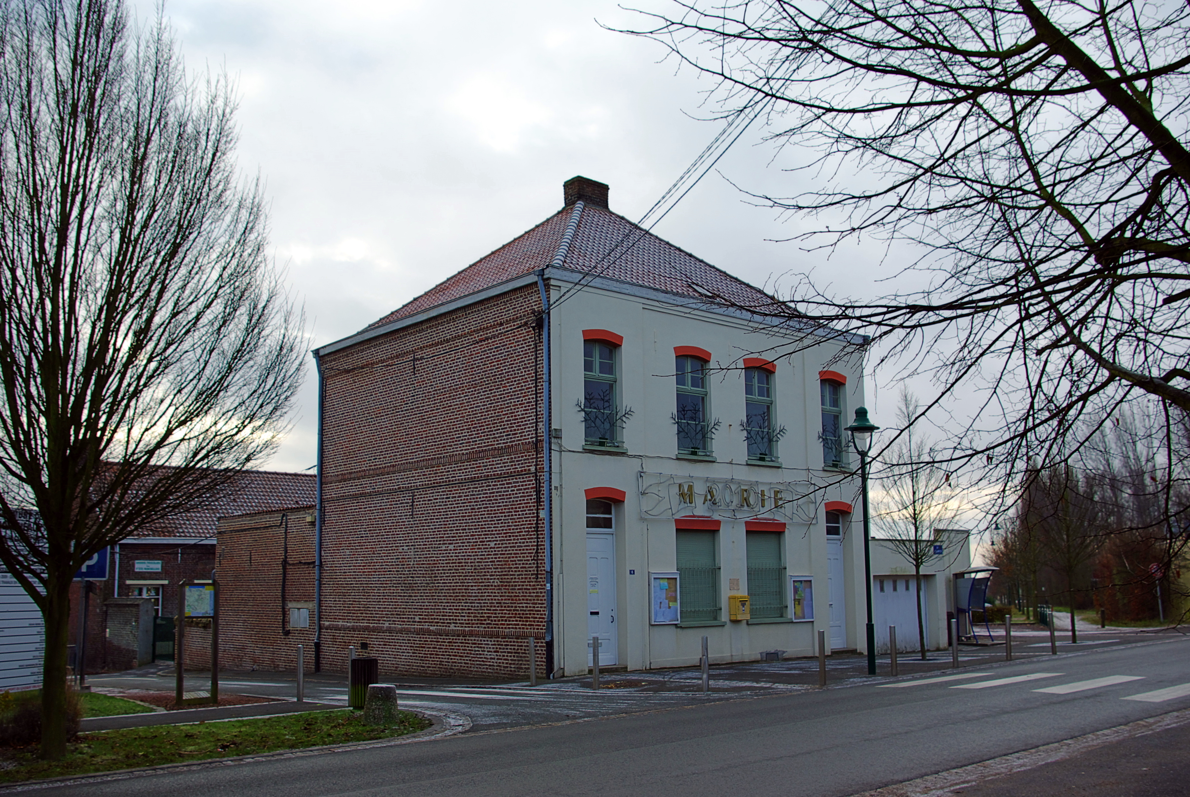 Mairie de Moncheaux, 16 rue du Bouvincourt, département du Nord, région Nord-Pas-de-Calais, France